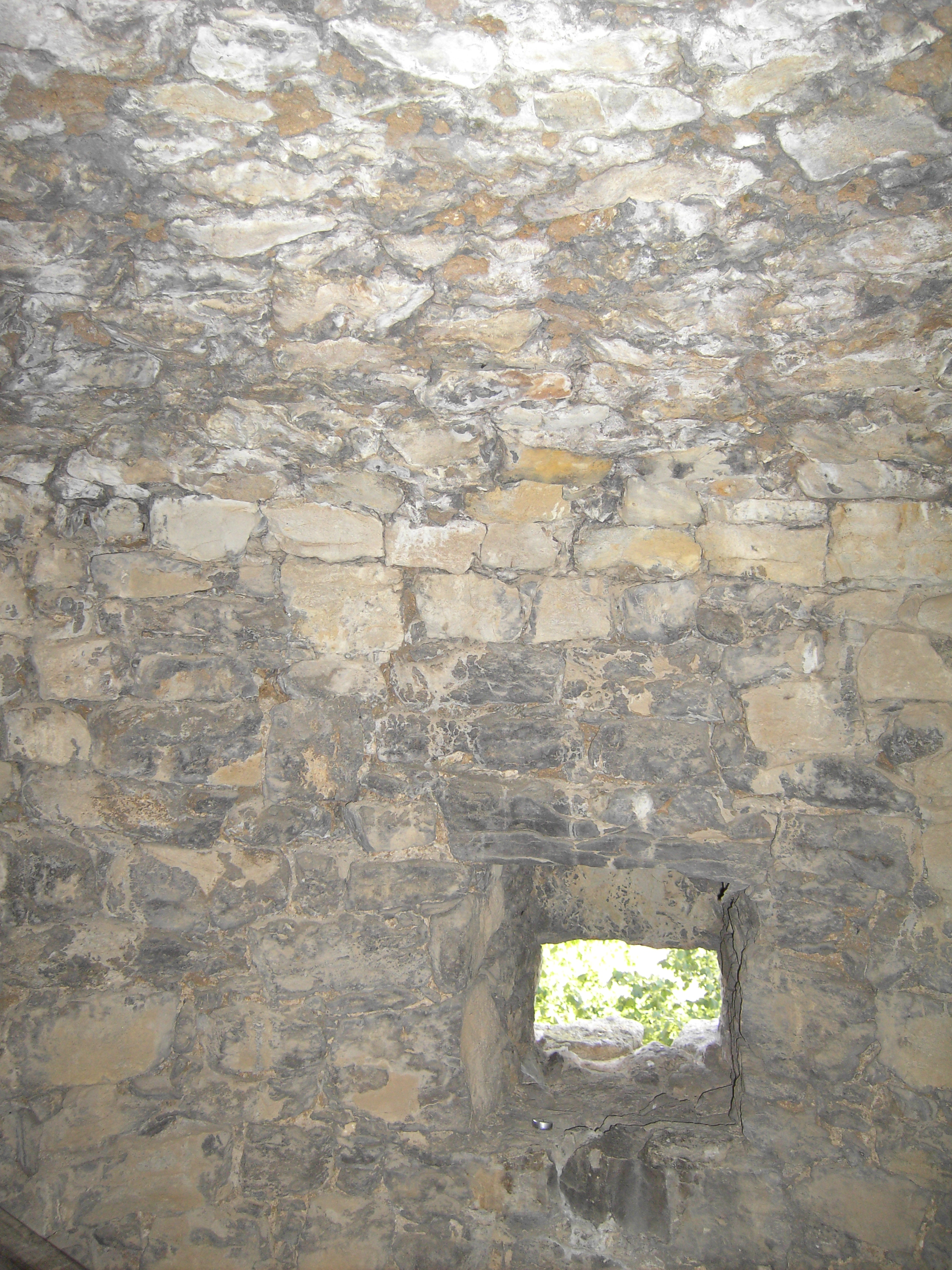 Ansicht eines Wartturmes von innen.